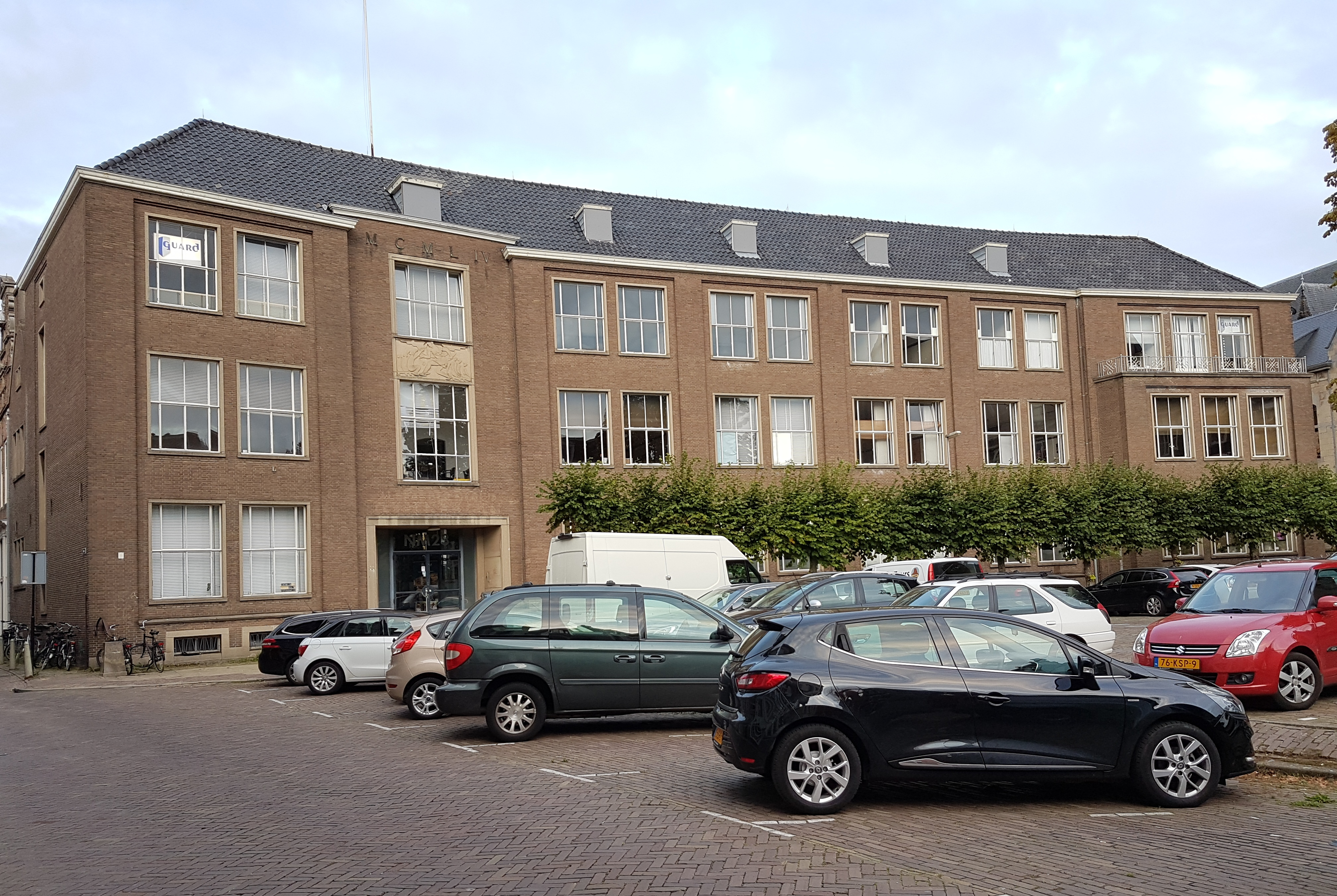 Voormalig Hegius-Gymnasium in Deventer, gebouw uit 1954 naar ontwerp van Wim Knuttel aan de Nieuwe Markt.